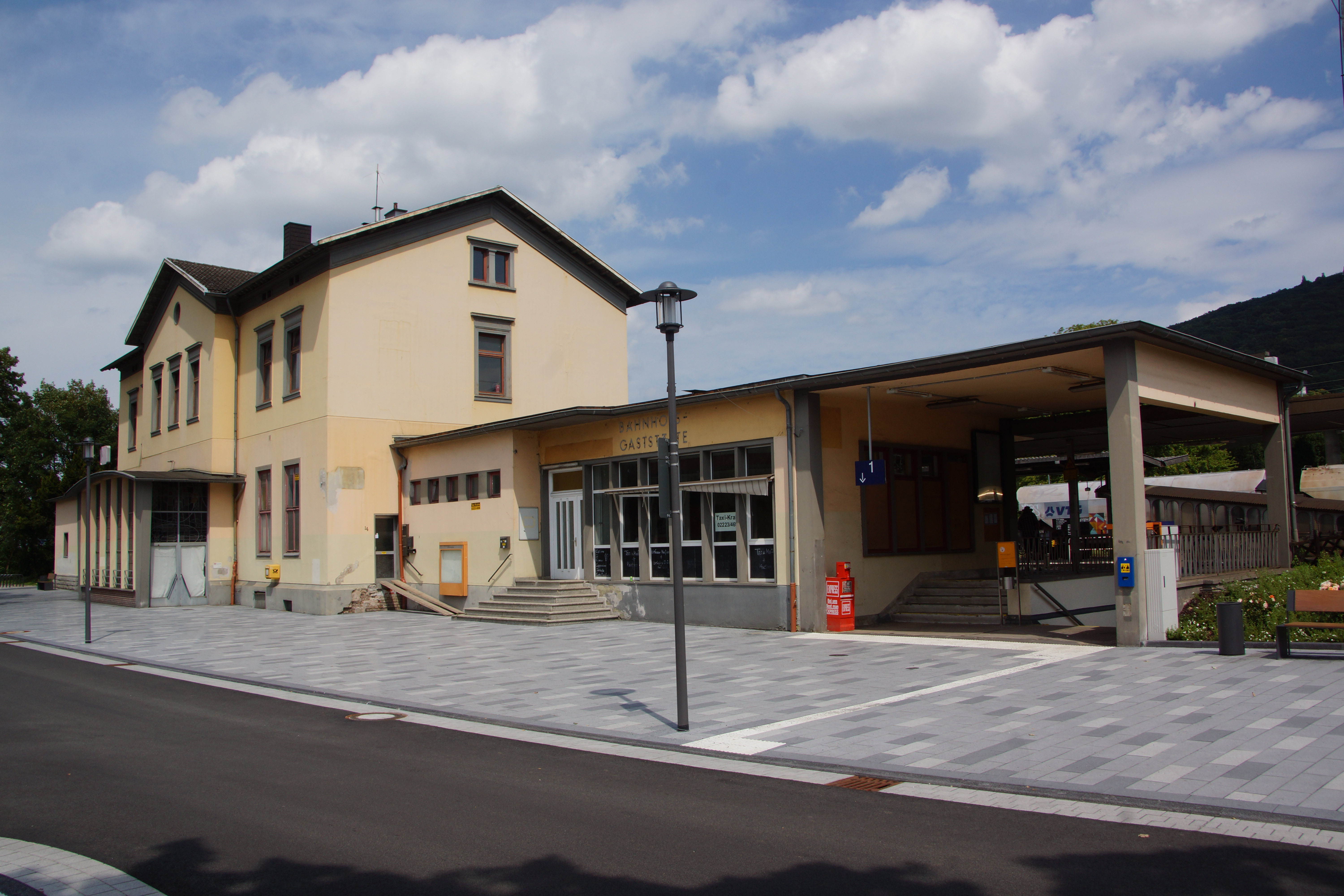 Bahnhof Königswinter, Bahnhofsallee 10